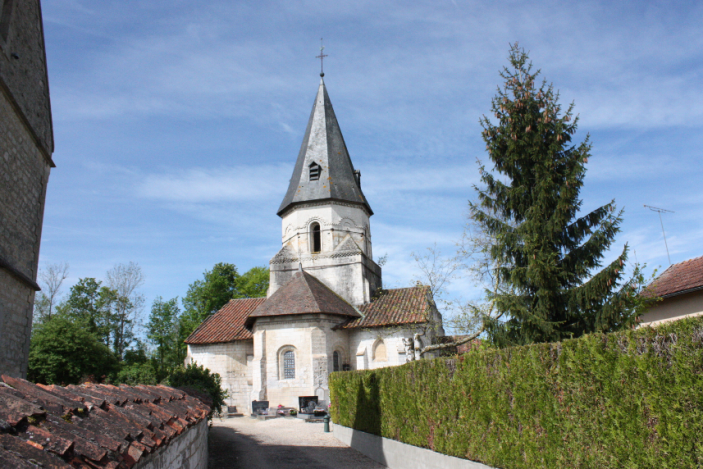 Église Saint-Pierre de Coulmiers (Classé) .